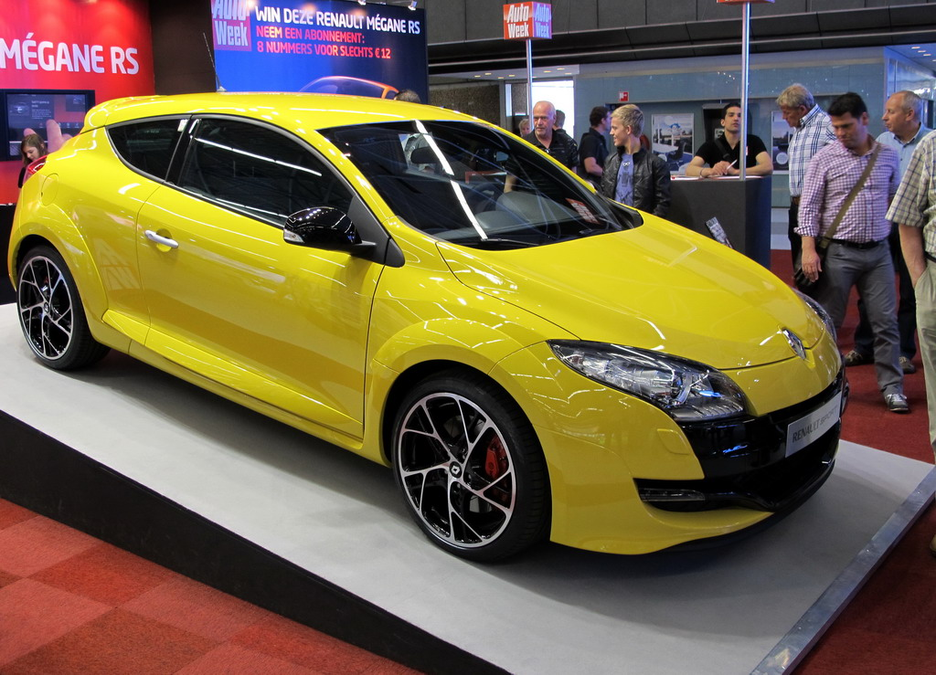 AutoRAI 2011 Amsterdam